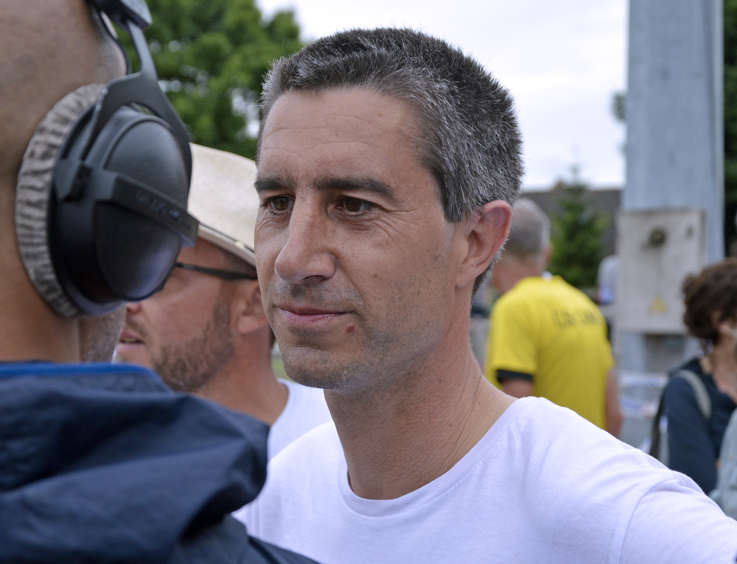 François Ruffin répondant à un journaliste à Longueau (80)